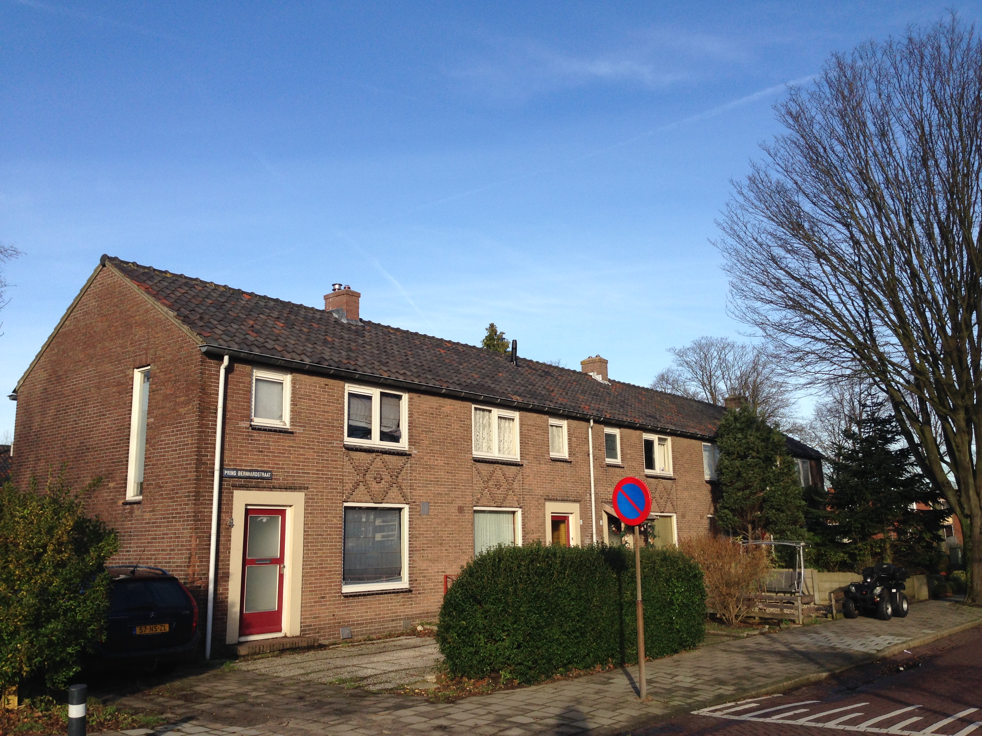 Naoorlogse sociale huurwoningen van Ymere in Hoofddorp, Prins Bernhardstraat